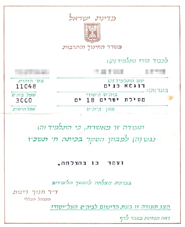 תעודת עמידה במבחן הסקר